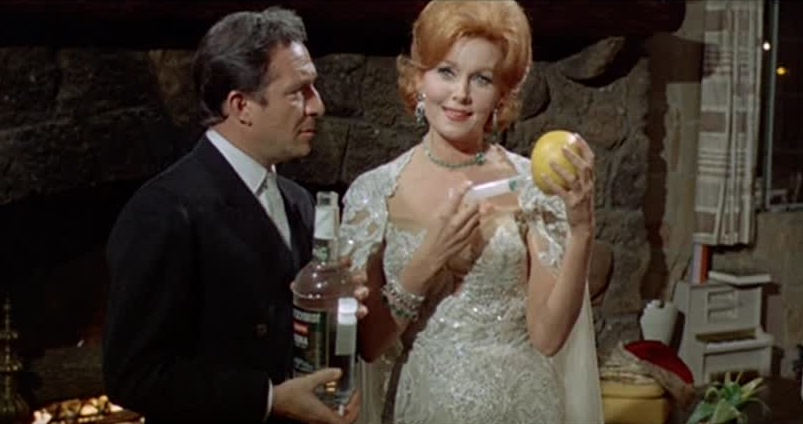 Screenshot del film Una moglie americana, 1965, regia di Gian Luigi Polidoro.